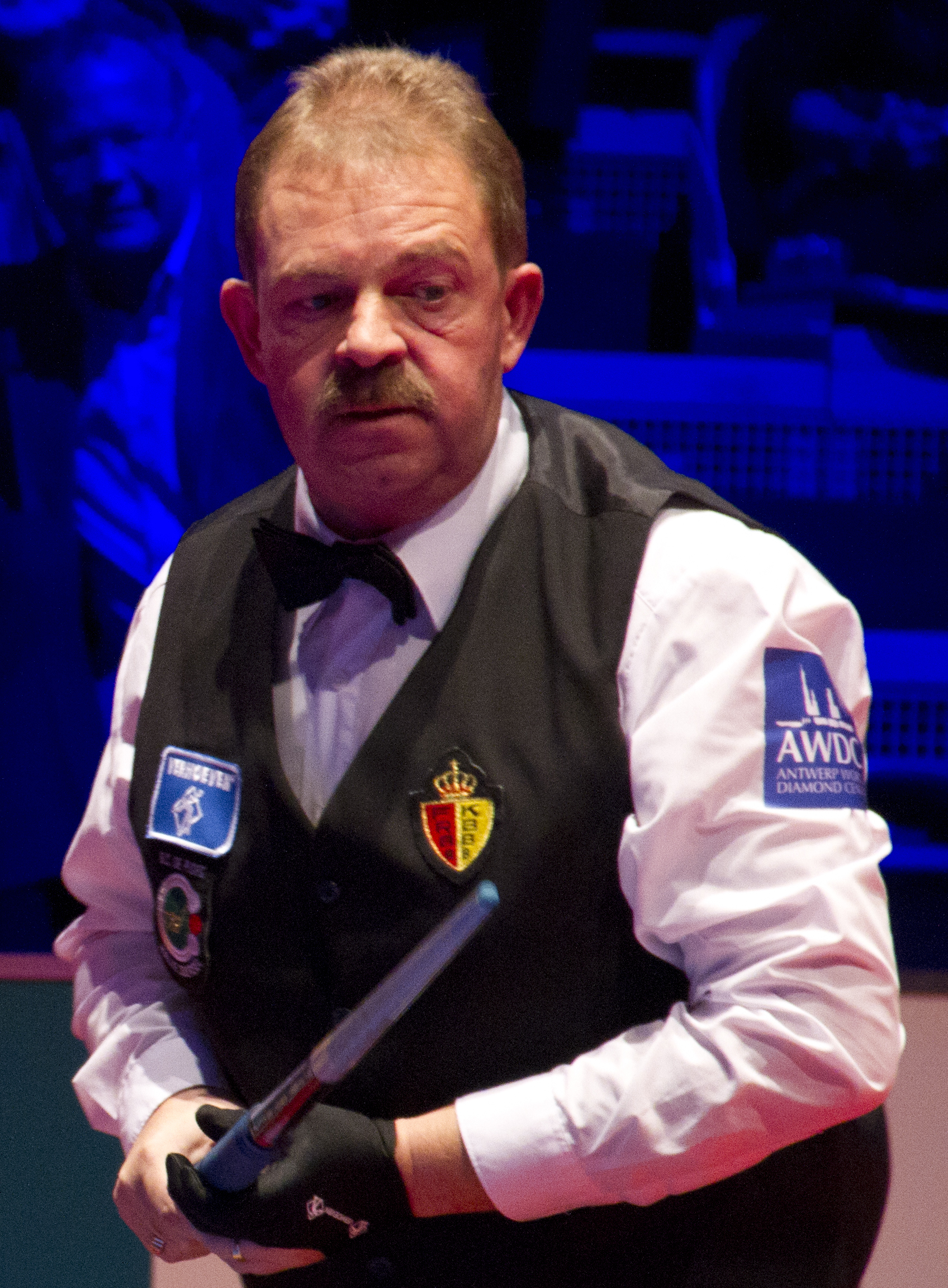 Portrait von Jozef Philipoom